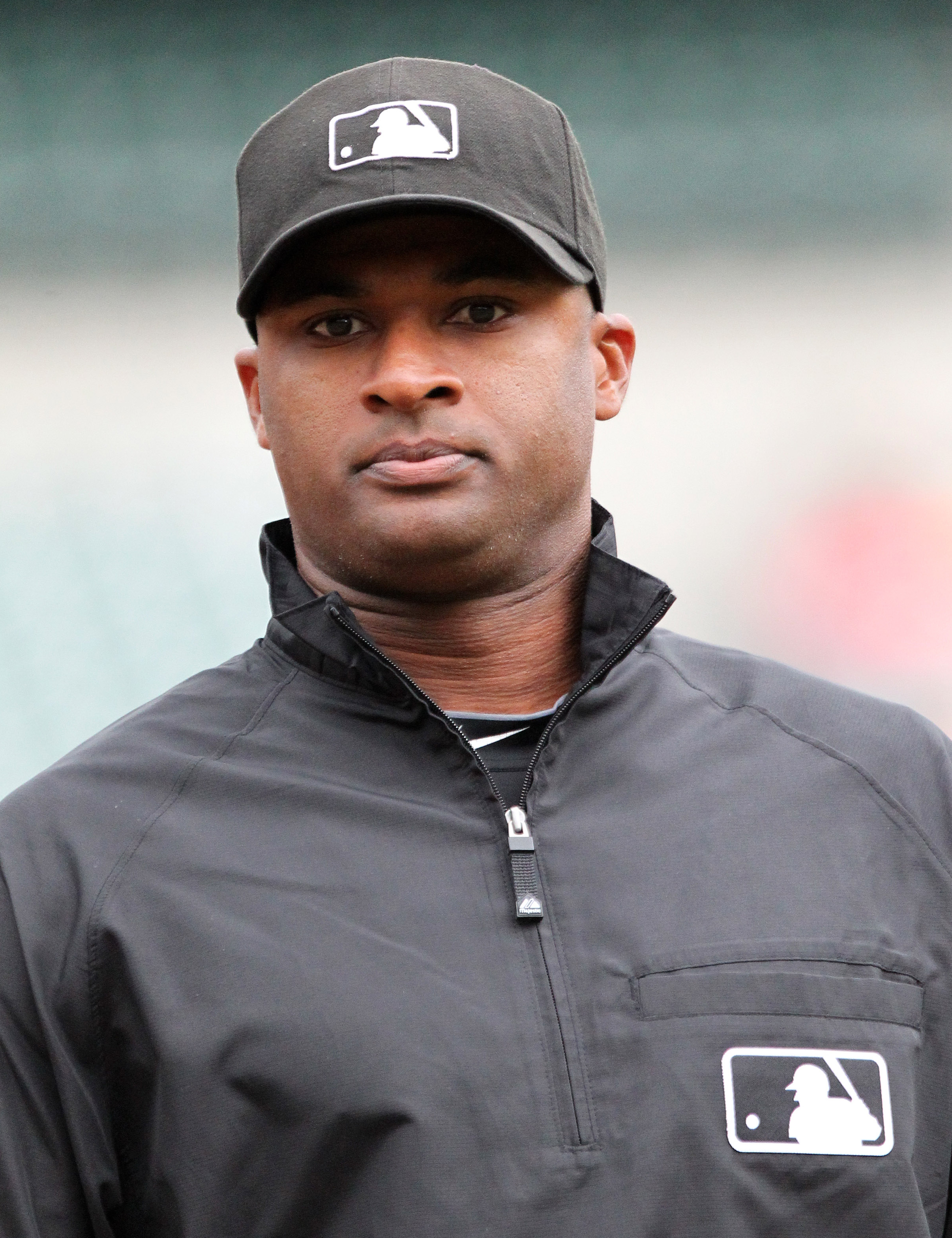 MLB umpire Alan Porter - Angels at Orioles September 18, 2011